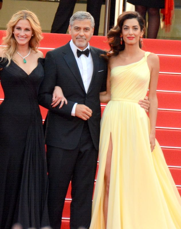 Présentation de "Money Monster" au festival de Cannes